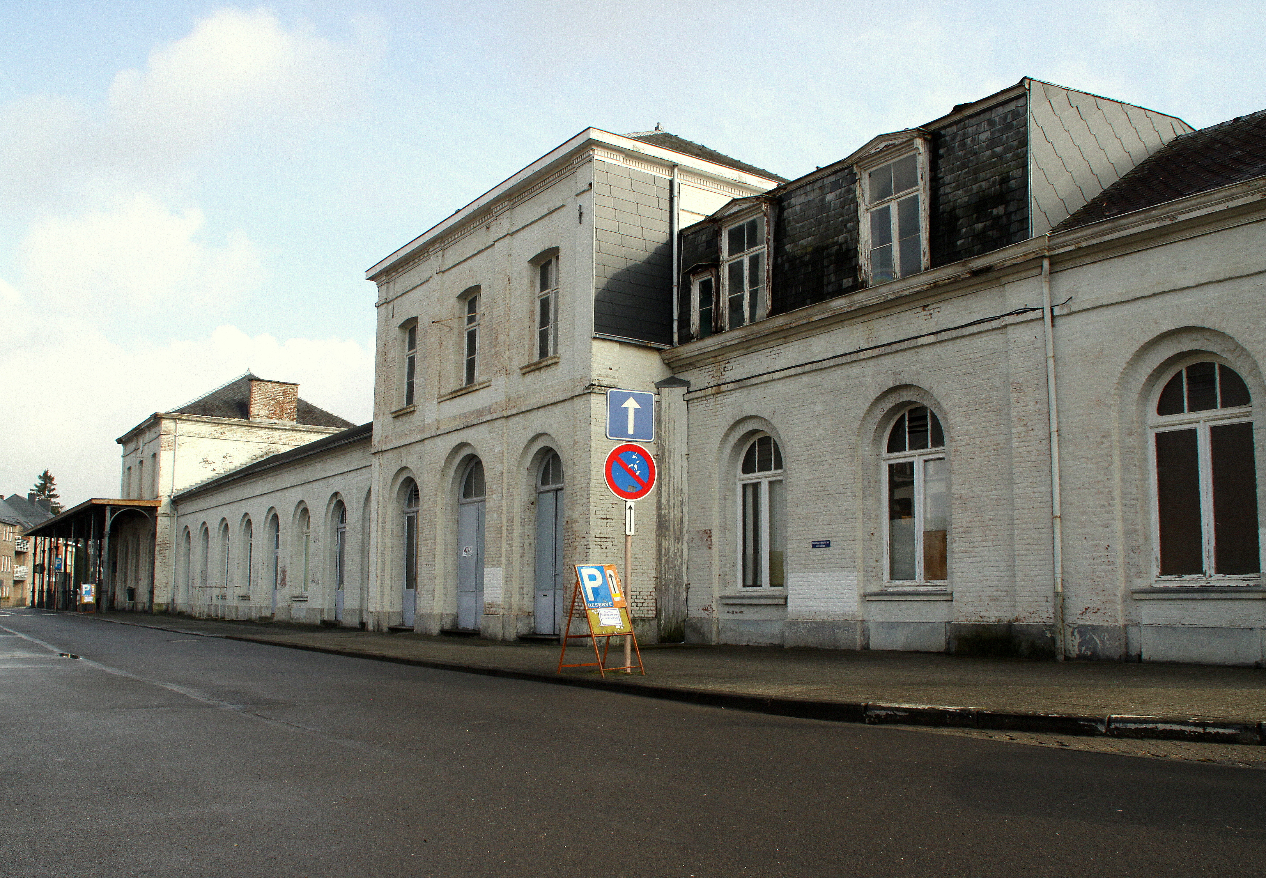 Gare vu Spa